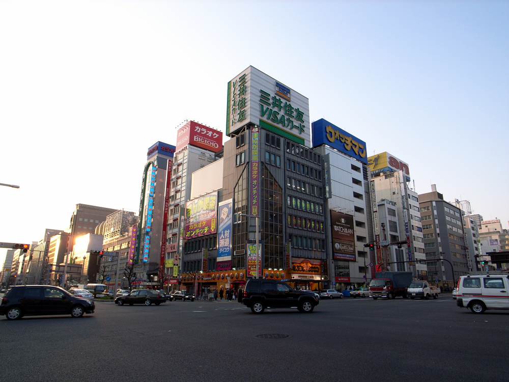 Sakae Crossing